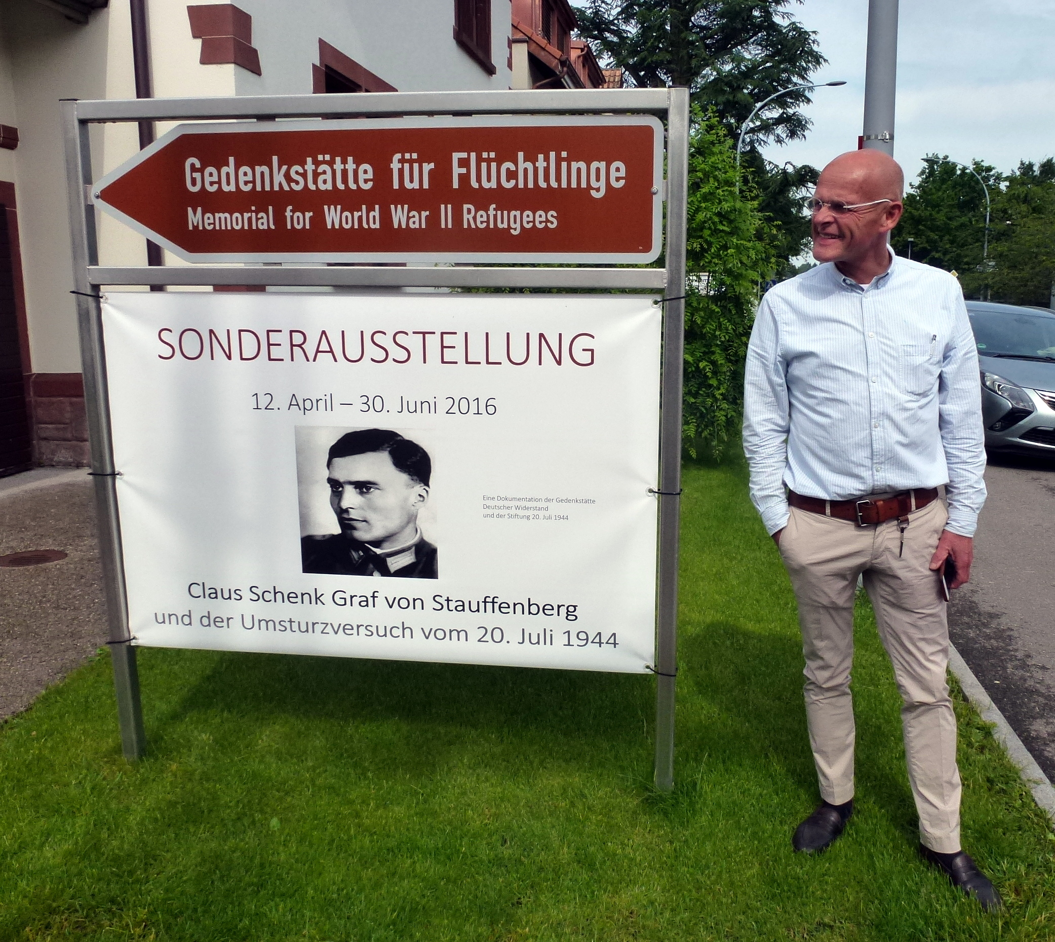 Riehen Gedenkstätte für Flüchtlinge mit Initiator Johannes Czwalina